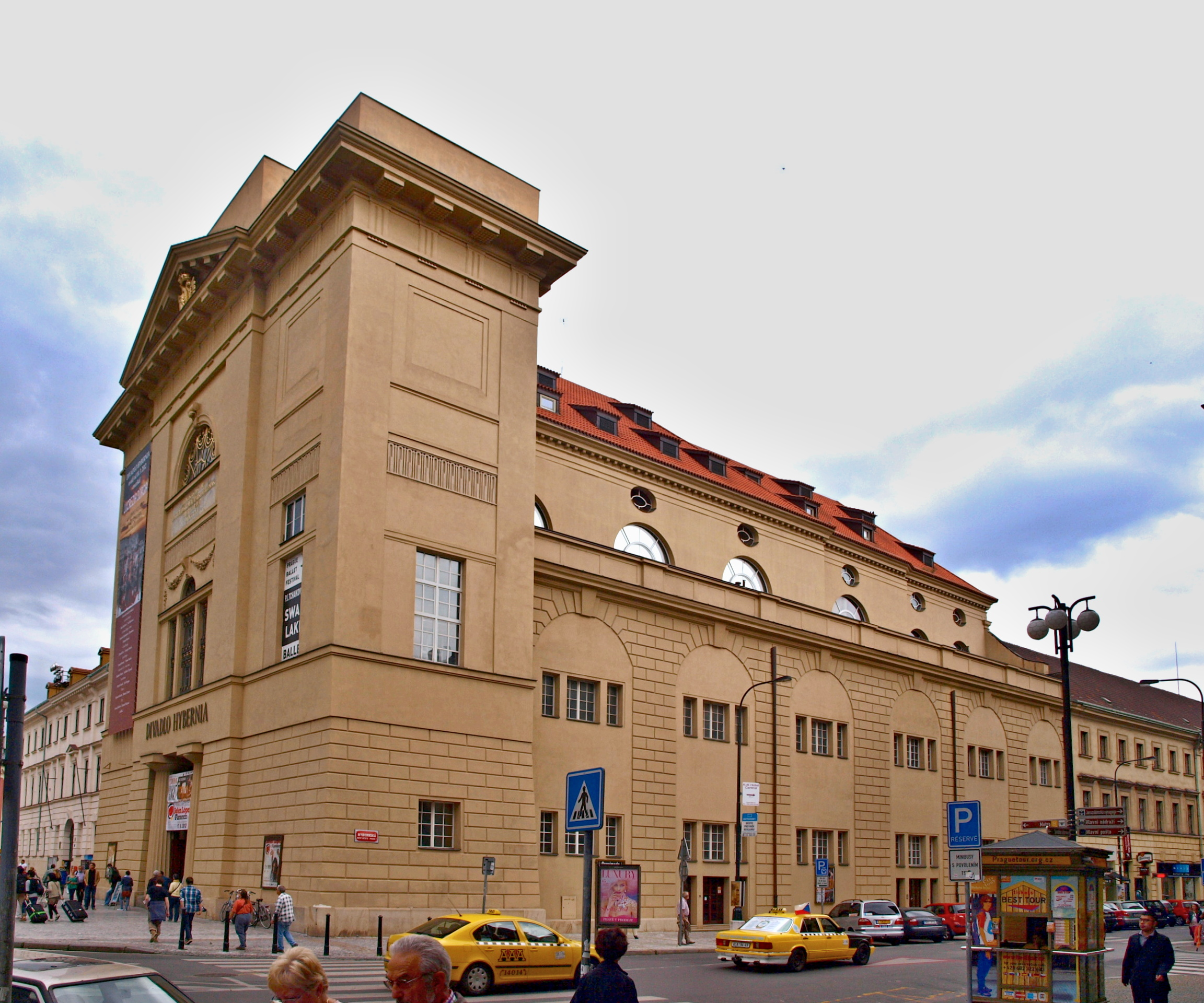 U Hybernů